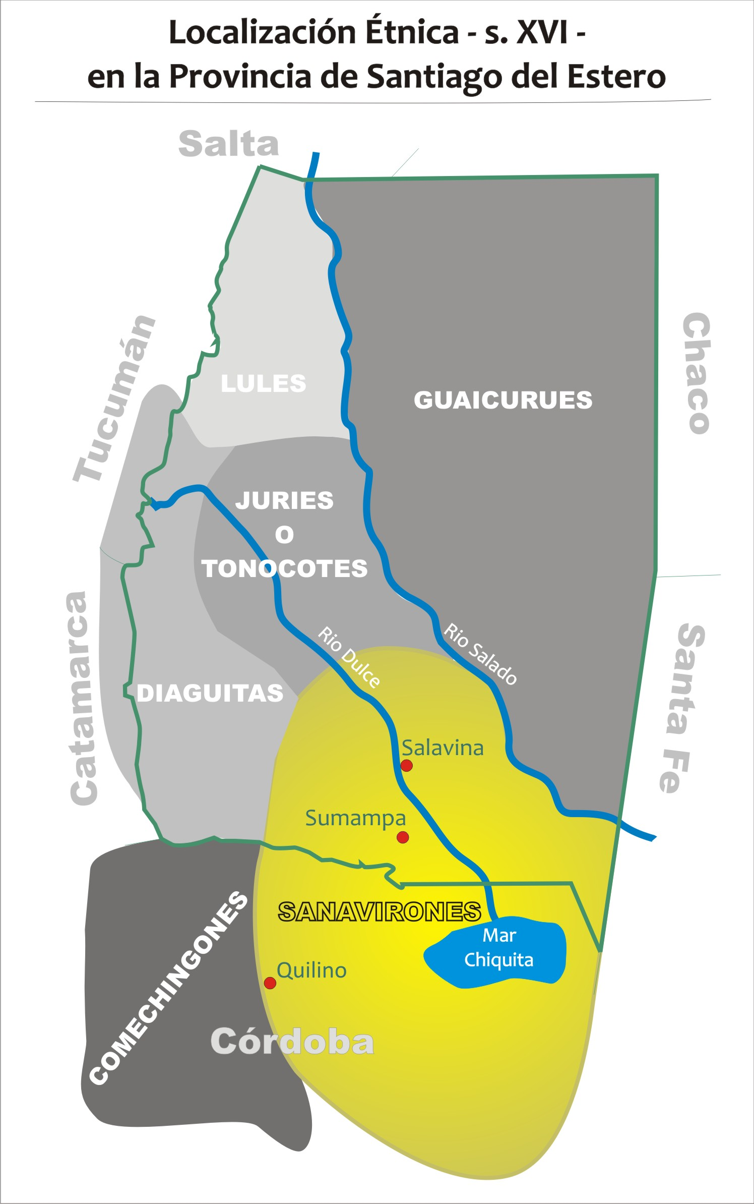 Localización etnica de los Sanavirones.